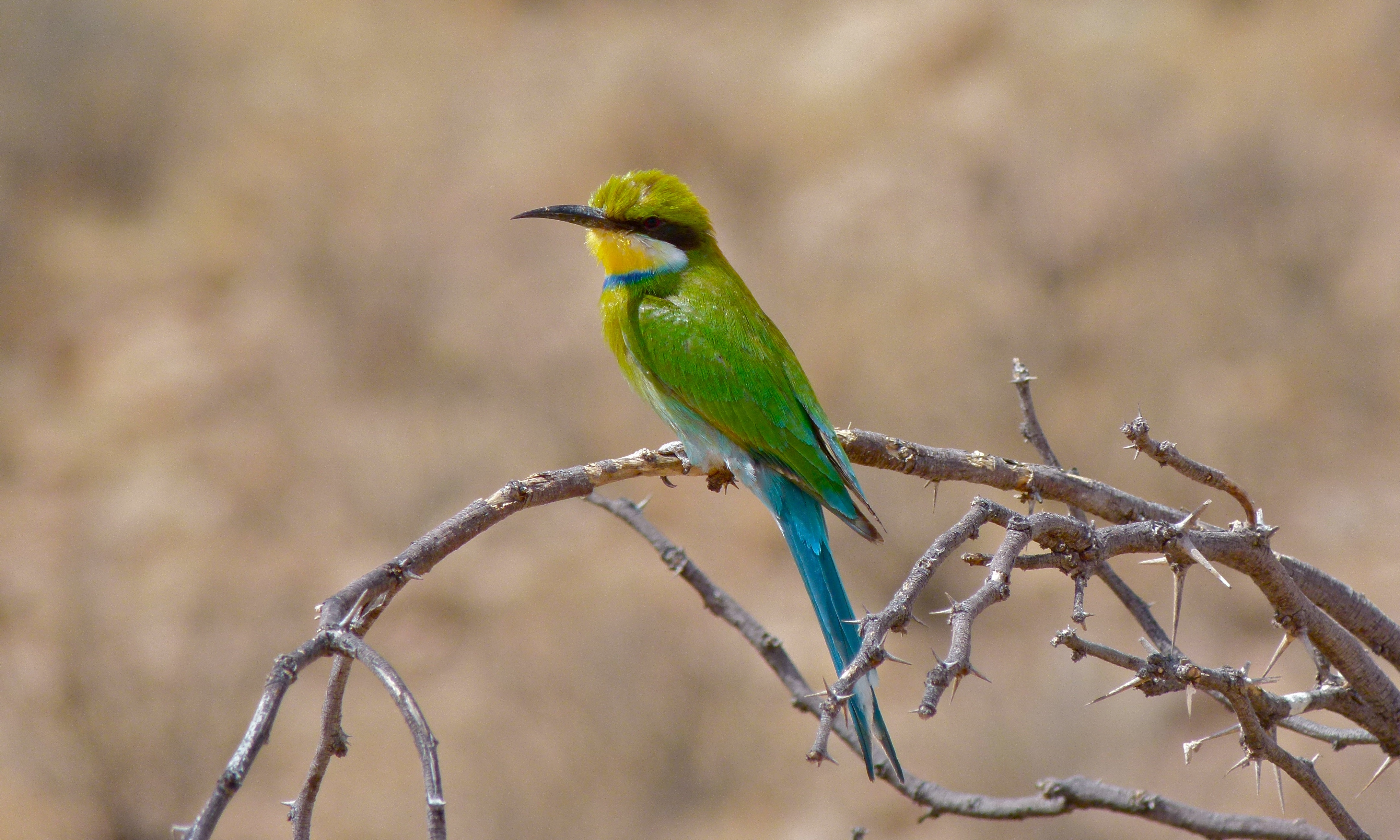 Auob Riverbed, Kgalagadi Transfrontier Park, SOUTH AFRICA